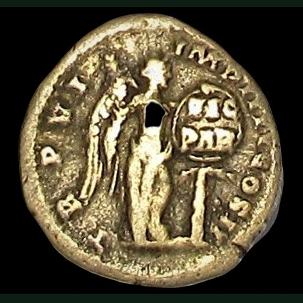 Denar anlässlich Triumph des Lucius Verus im Jahr 166, Victoria mit Schild VIC PAR, Kampmann 39.29